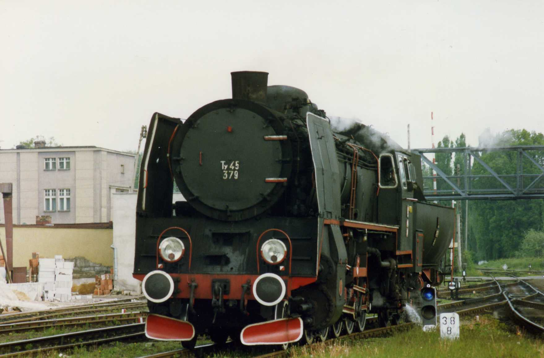 Ty45 379 at Wolsztyn may 1991